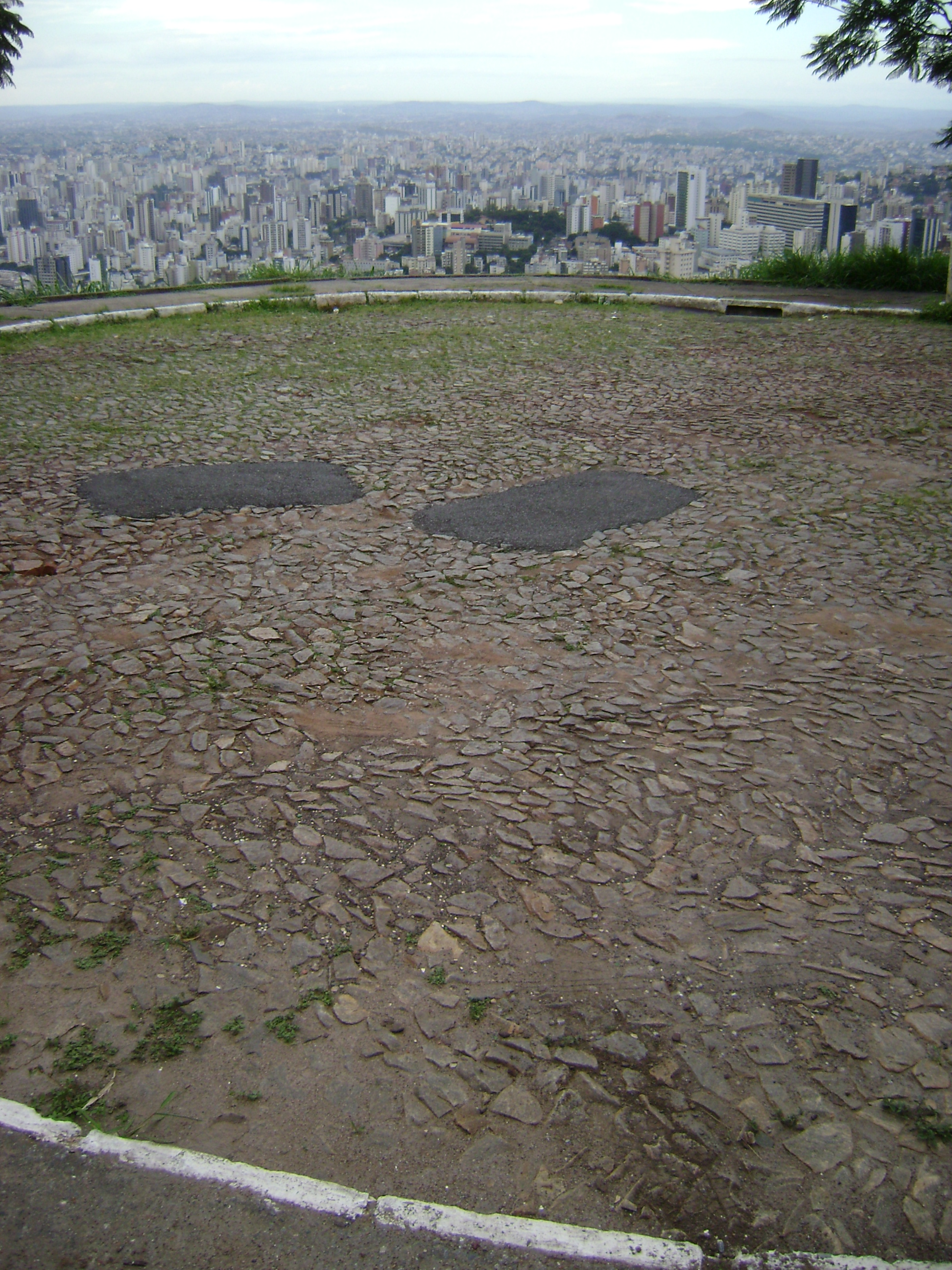 Mirante na rua Ministro Vilas Boas, no bairro Mangabeiras, em Belo Horizonte, Brasil.